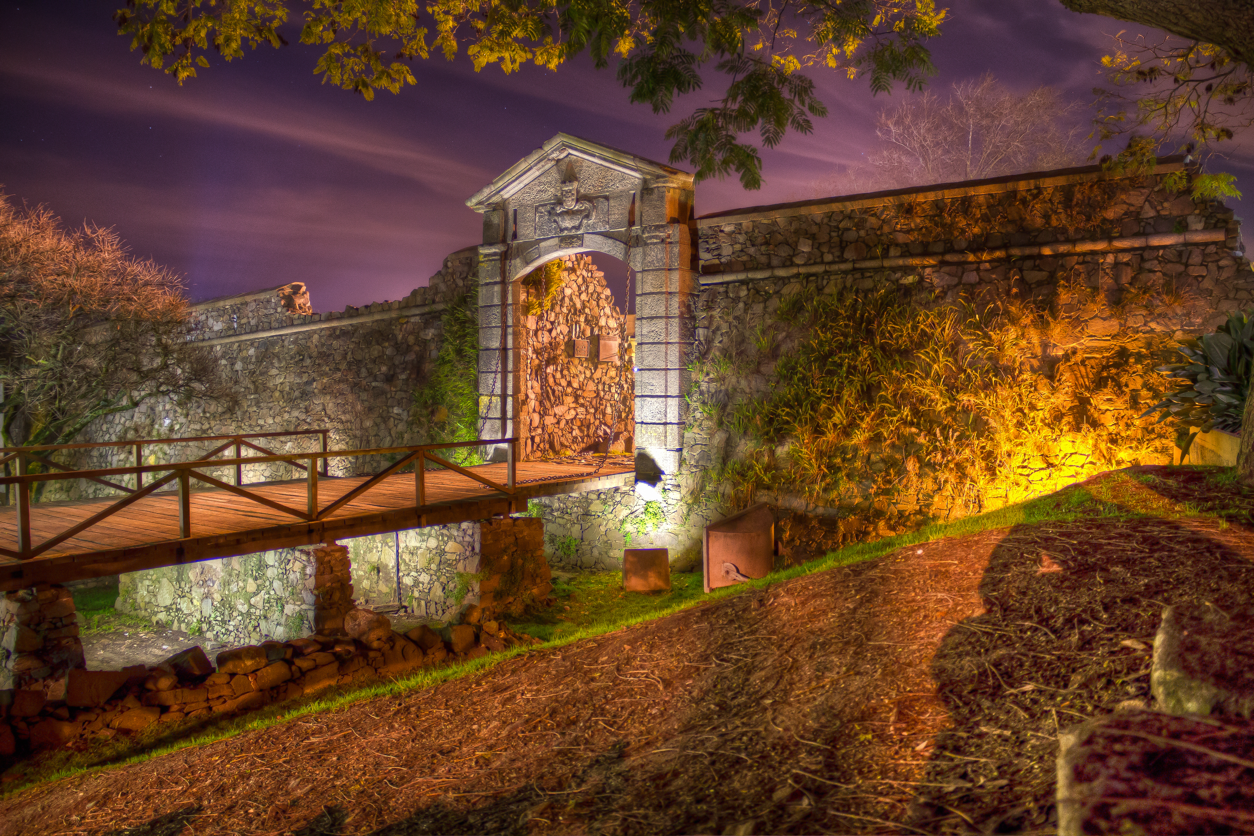 Sector de las murallas de la antigua Colonia del Sacramento, portón de campo, foso, bastión de San Pedro, bastión de San Miguel y entorno. Ubicada en la ciudad de Colonia del Sacramento, Uruguay. Foto por Fefo Bouvier.